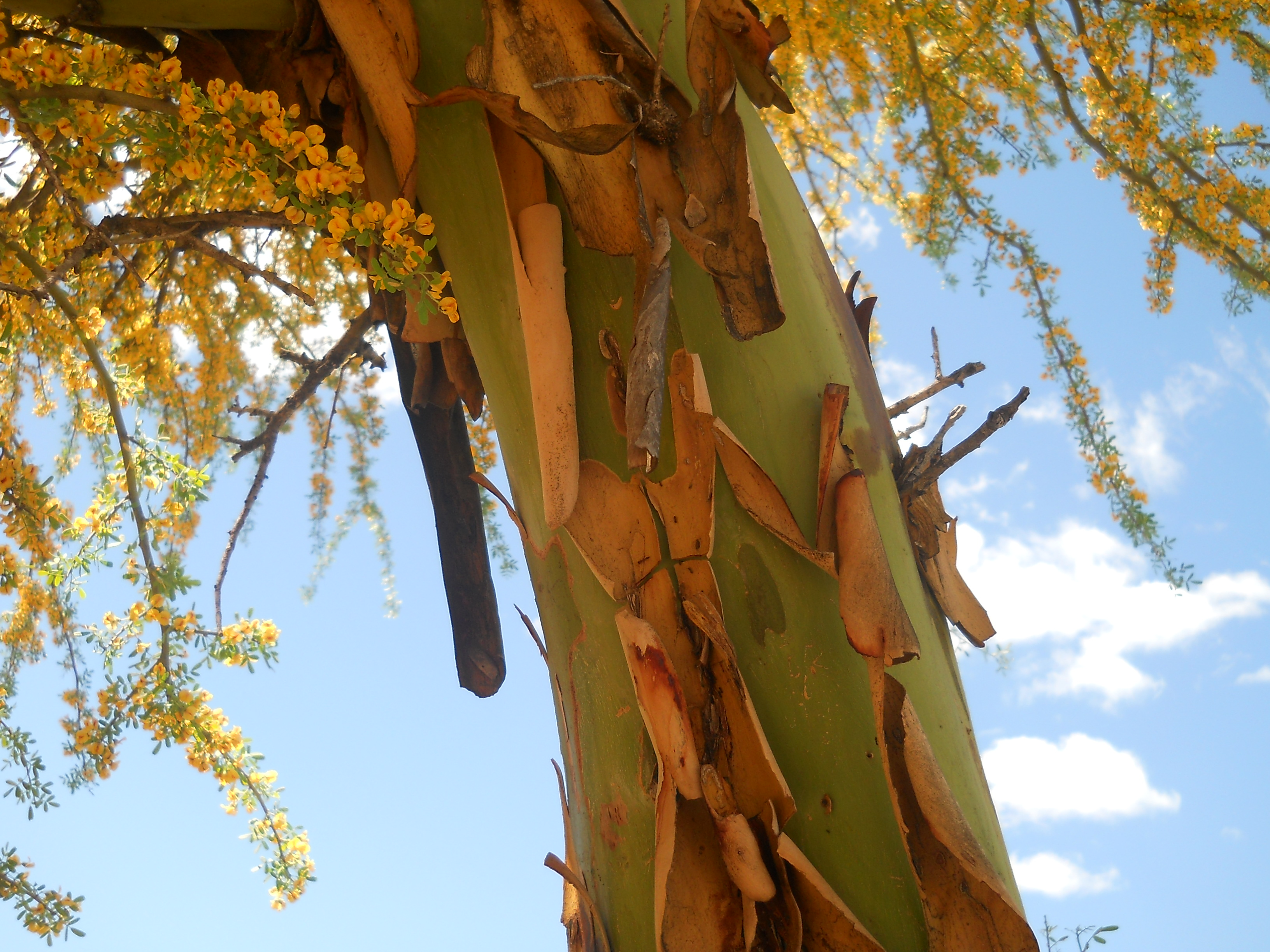 Detalle del tronco